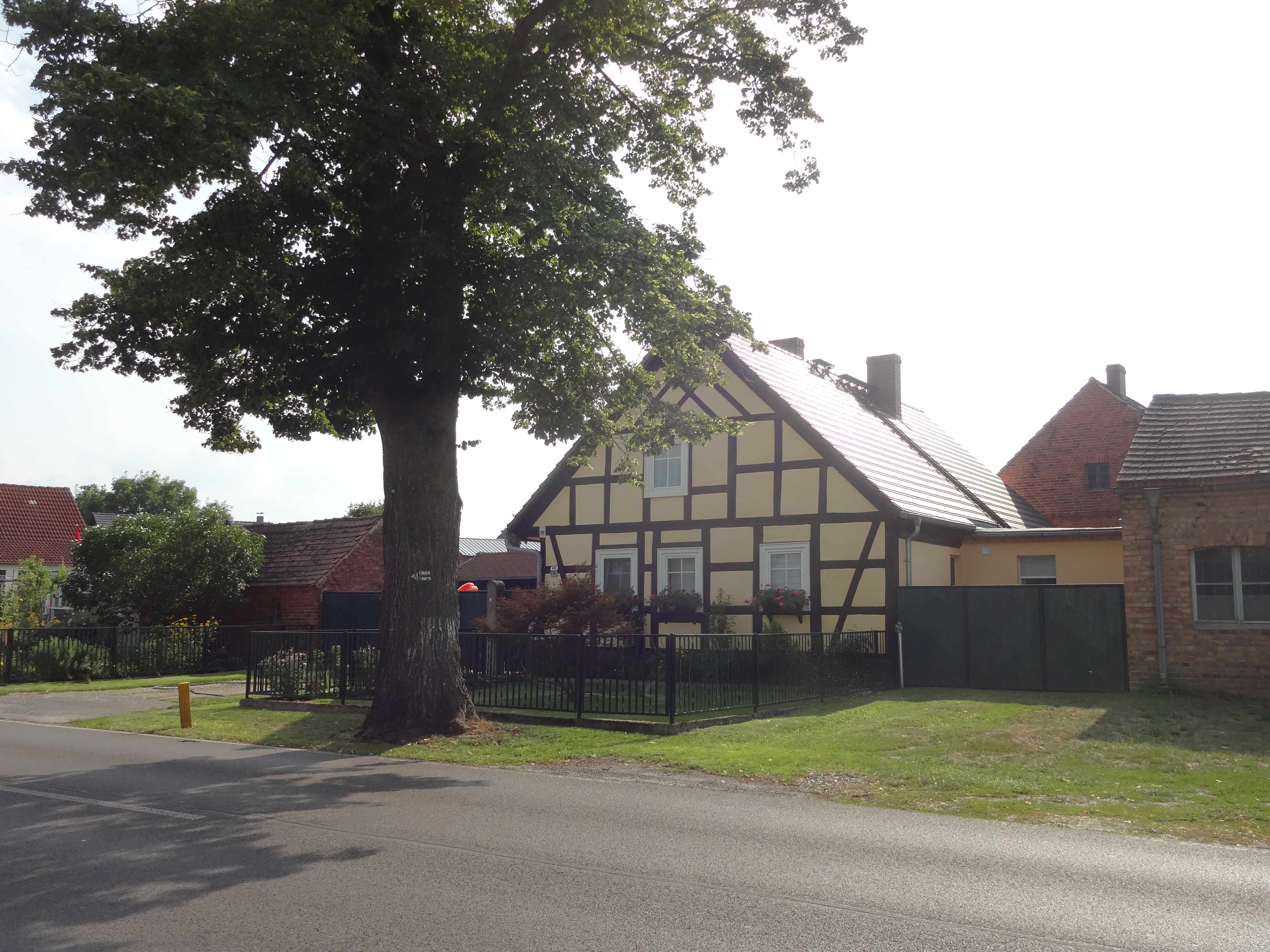 denkmalgeschütztes Bauernhaus in der Berliner Chaussee 10 in Ragow (Lübbenau/Spreewald)